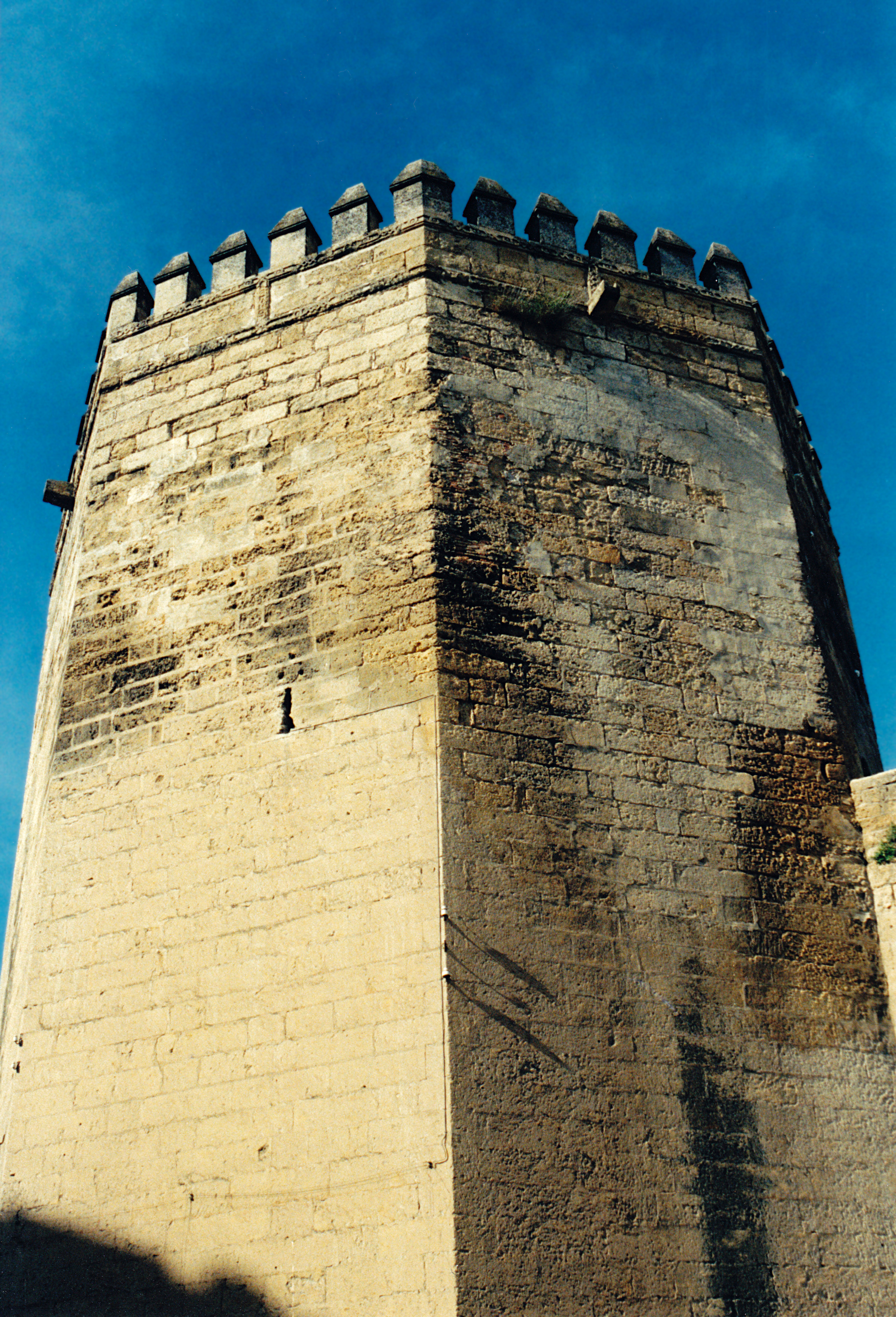 Cordoue - Tour de la Malmuerta (style mudéjar)